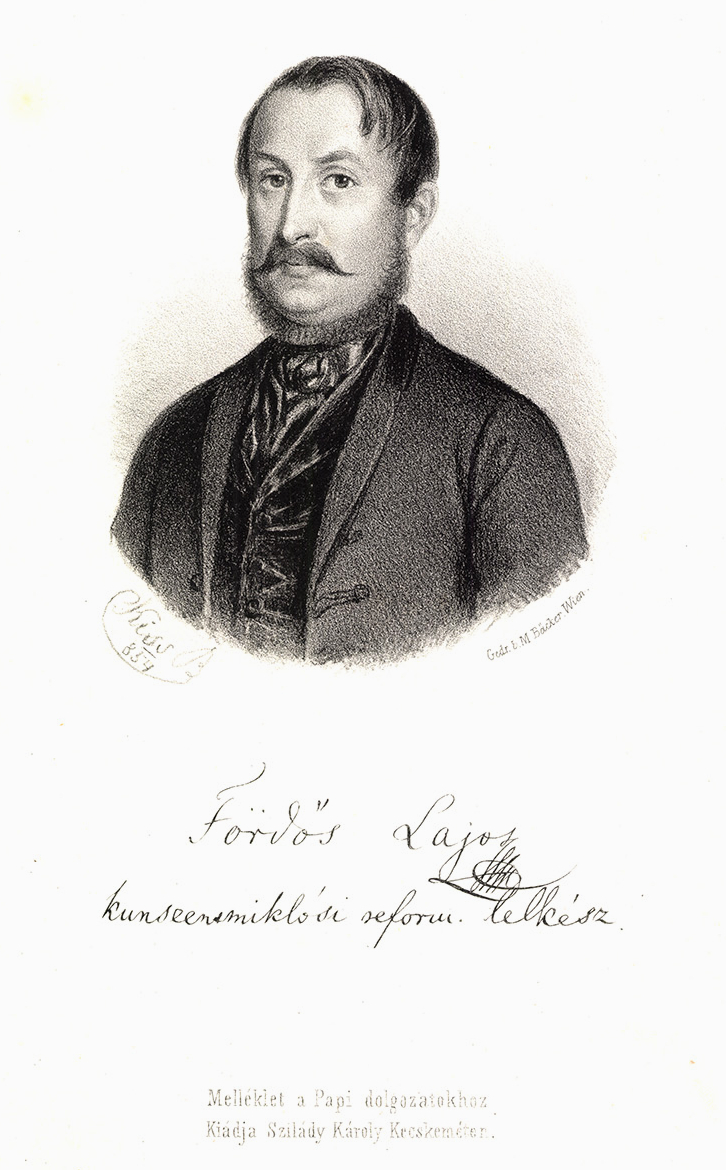 Fördős Lajos (Gyönk, 1817. június 7. – Kecskemét, 1884. május 5.) református lelkész, főesperes, író, költő.